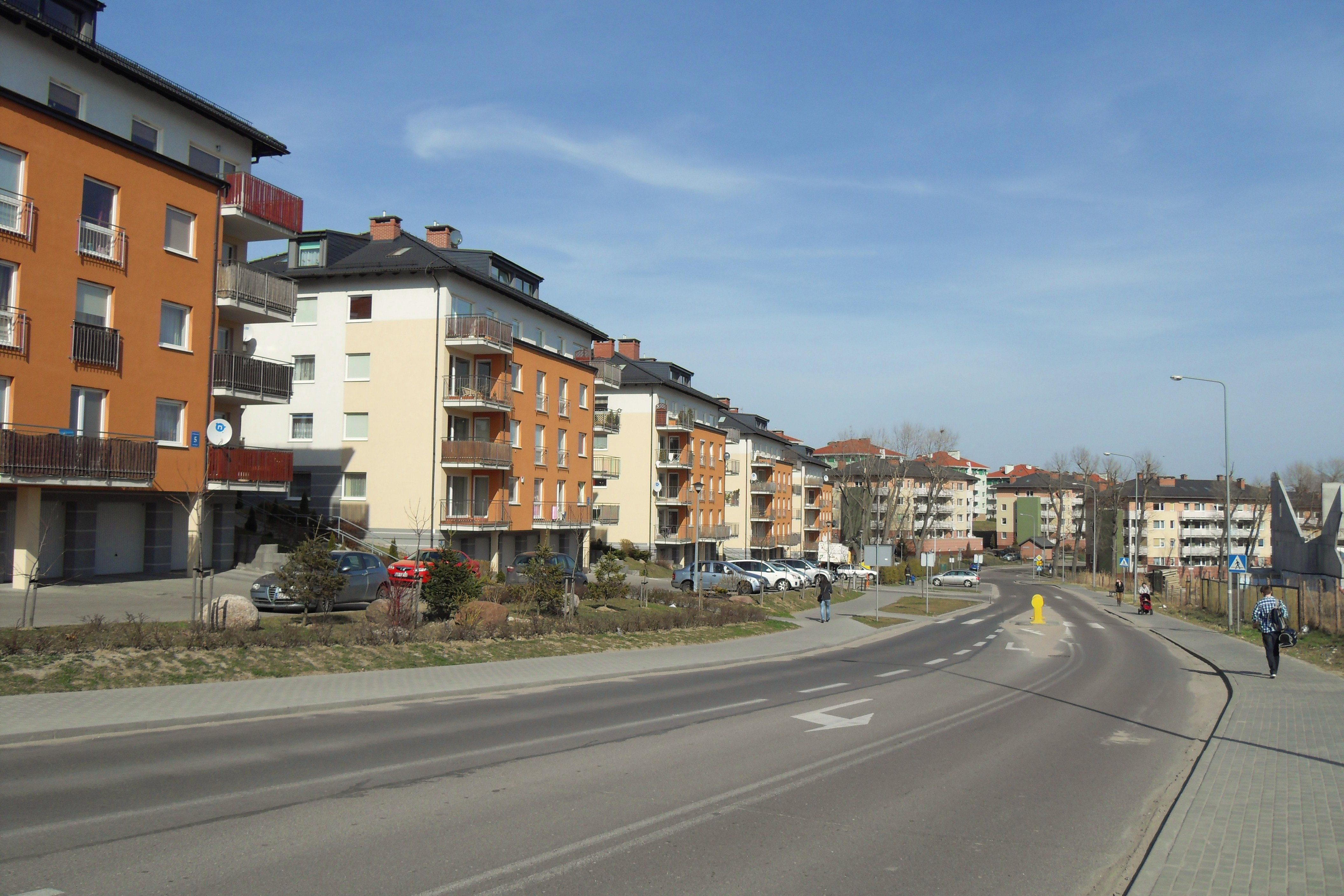 Gdańsk Ujeścisko, ul. Nieborowska.